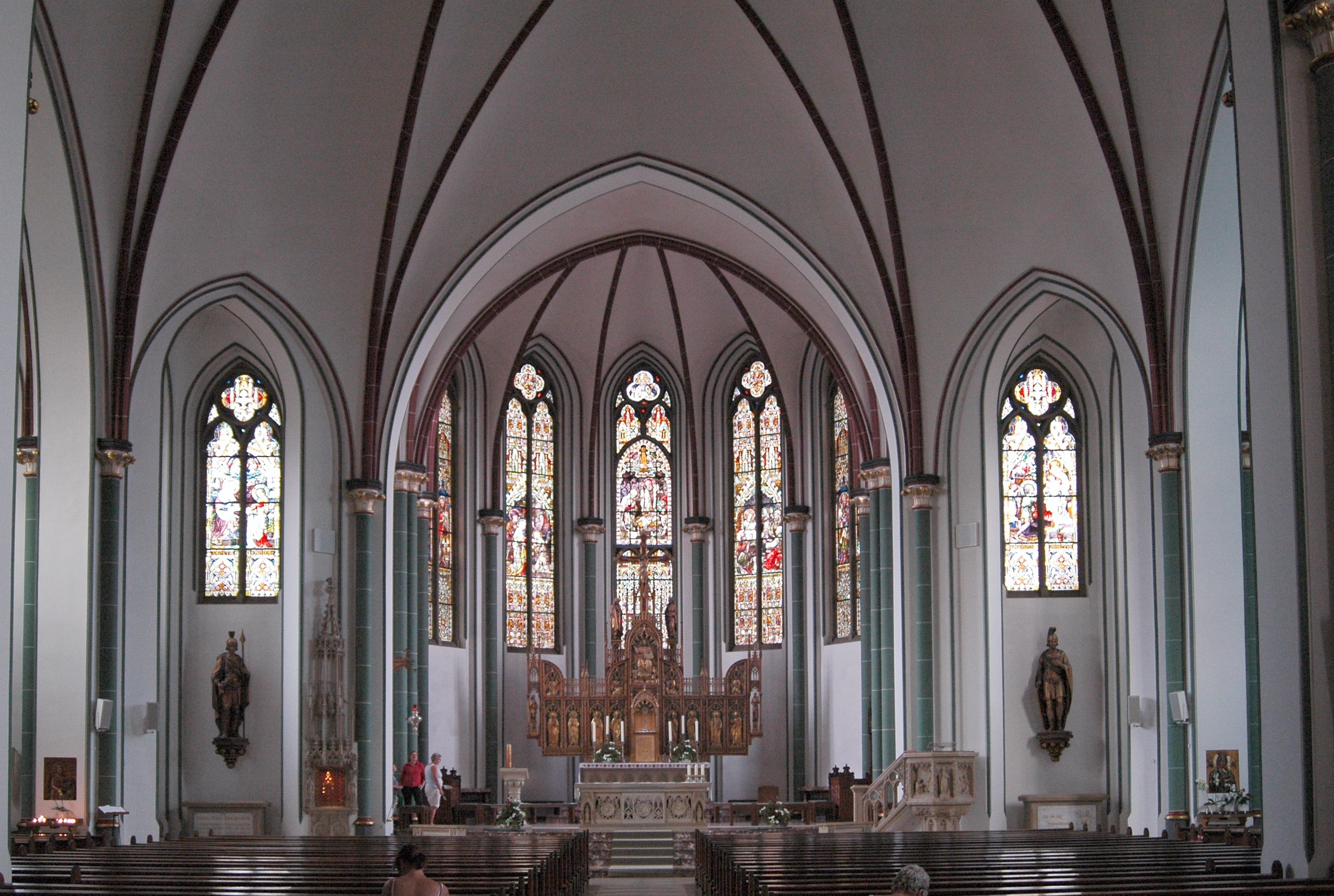 St.-Viktor-Kirche in Damme, Innenraum